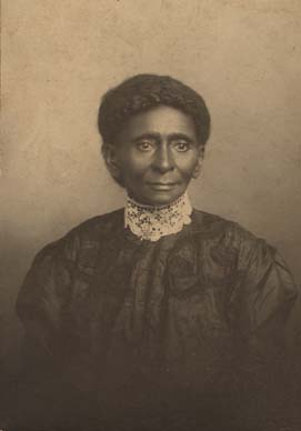 Maria Fearing (1838-1937)